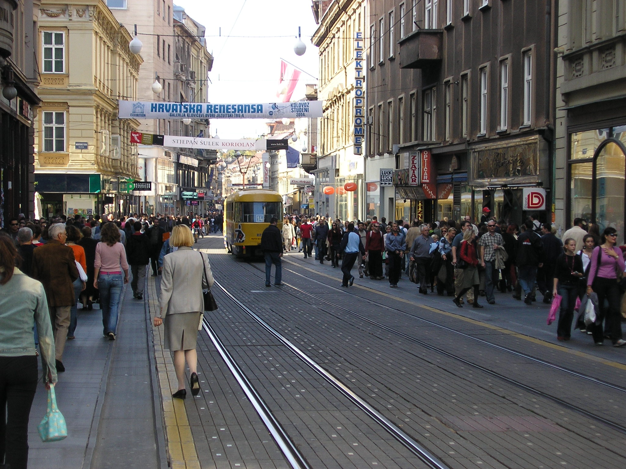 Ilica street in Zagreb